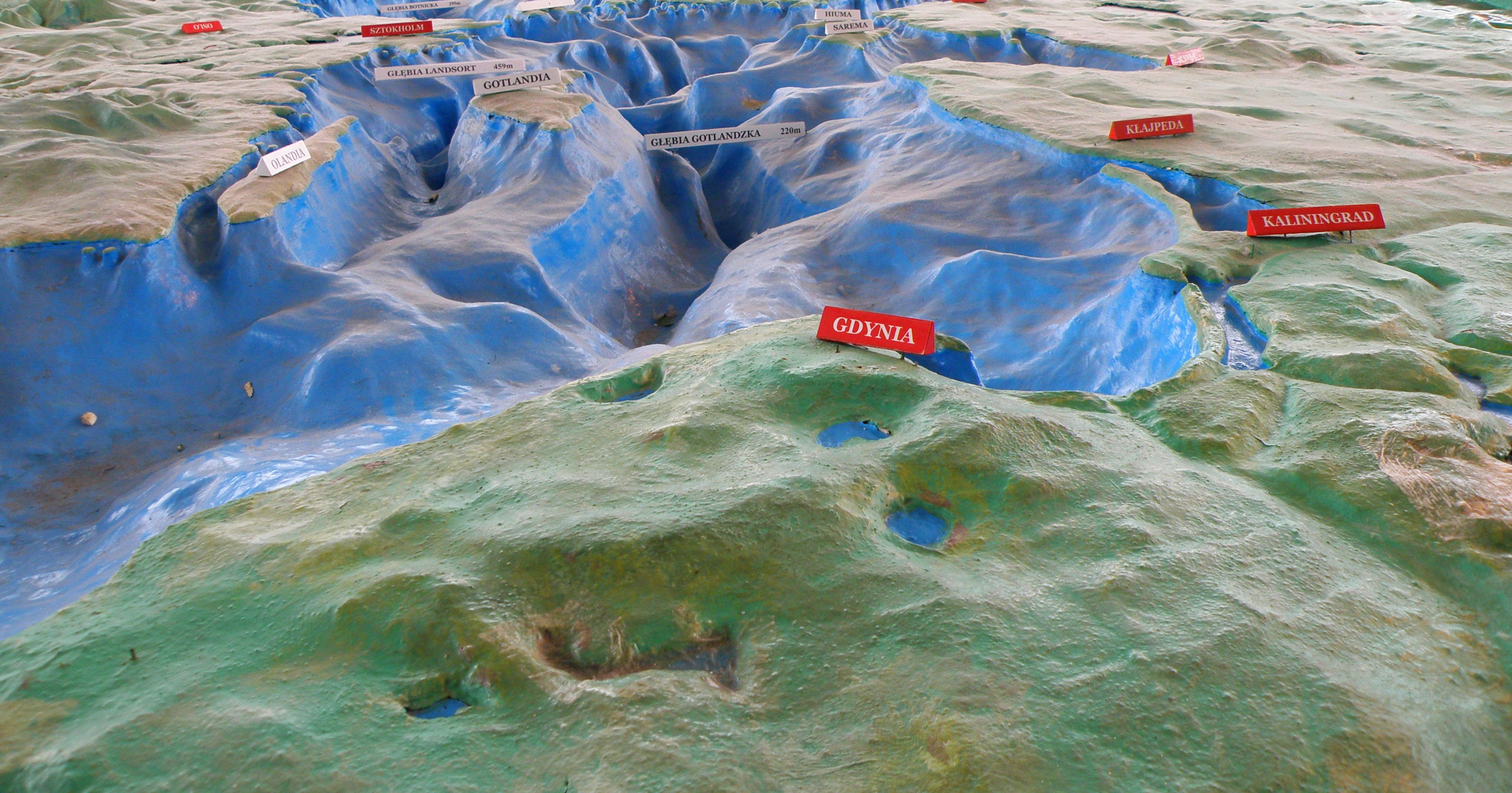 Gdynia, Akwarium Gdyńskie, makieta Morza Bałtyckiego